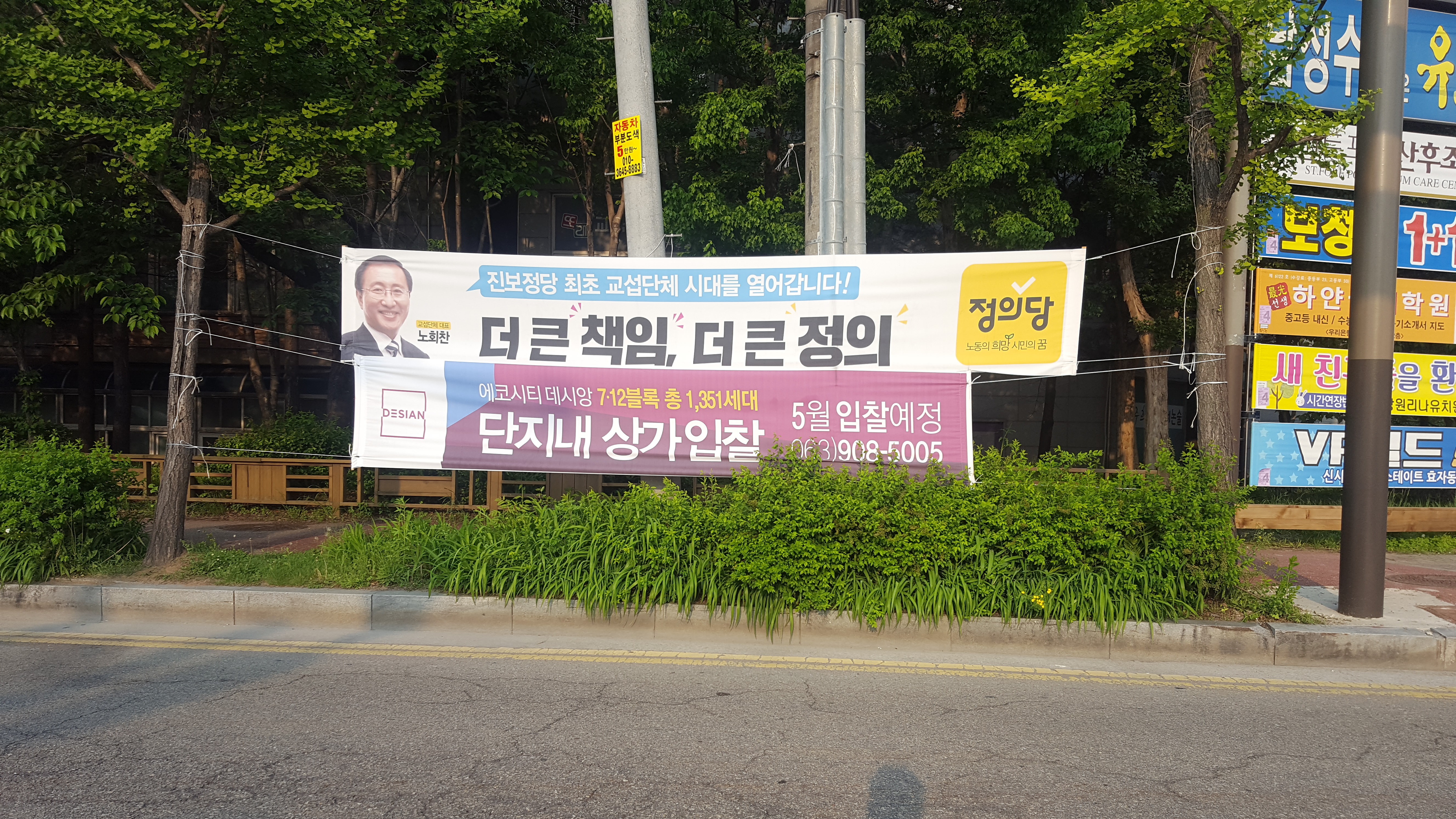 정의당이 진보정당 최초로 교섭단체가 됐음을 홍보하는 현수막